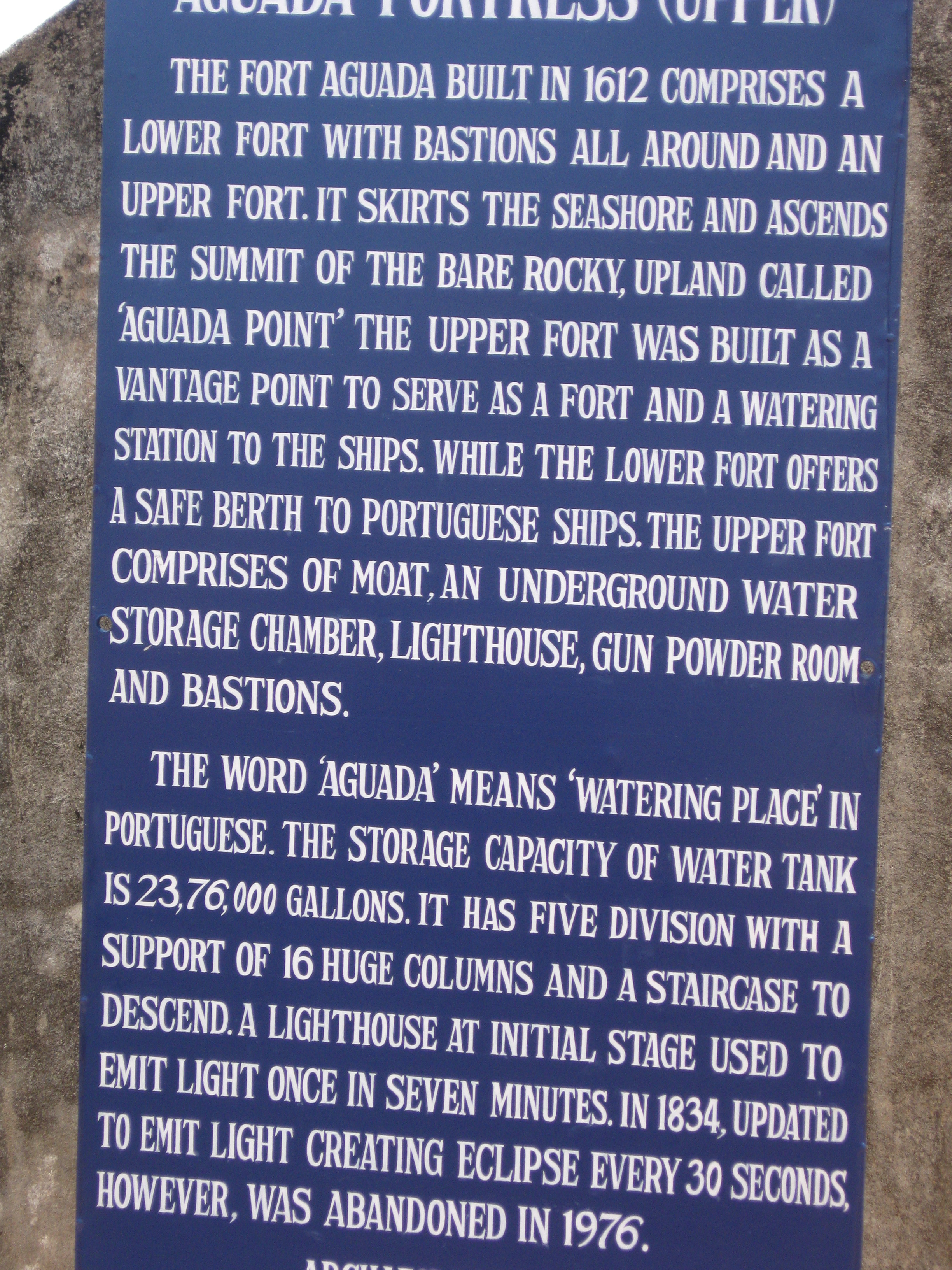 Fort Aquada